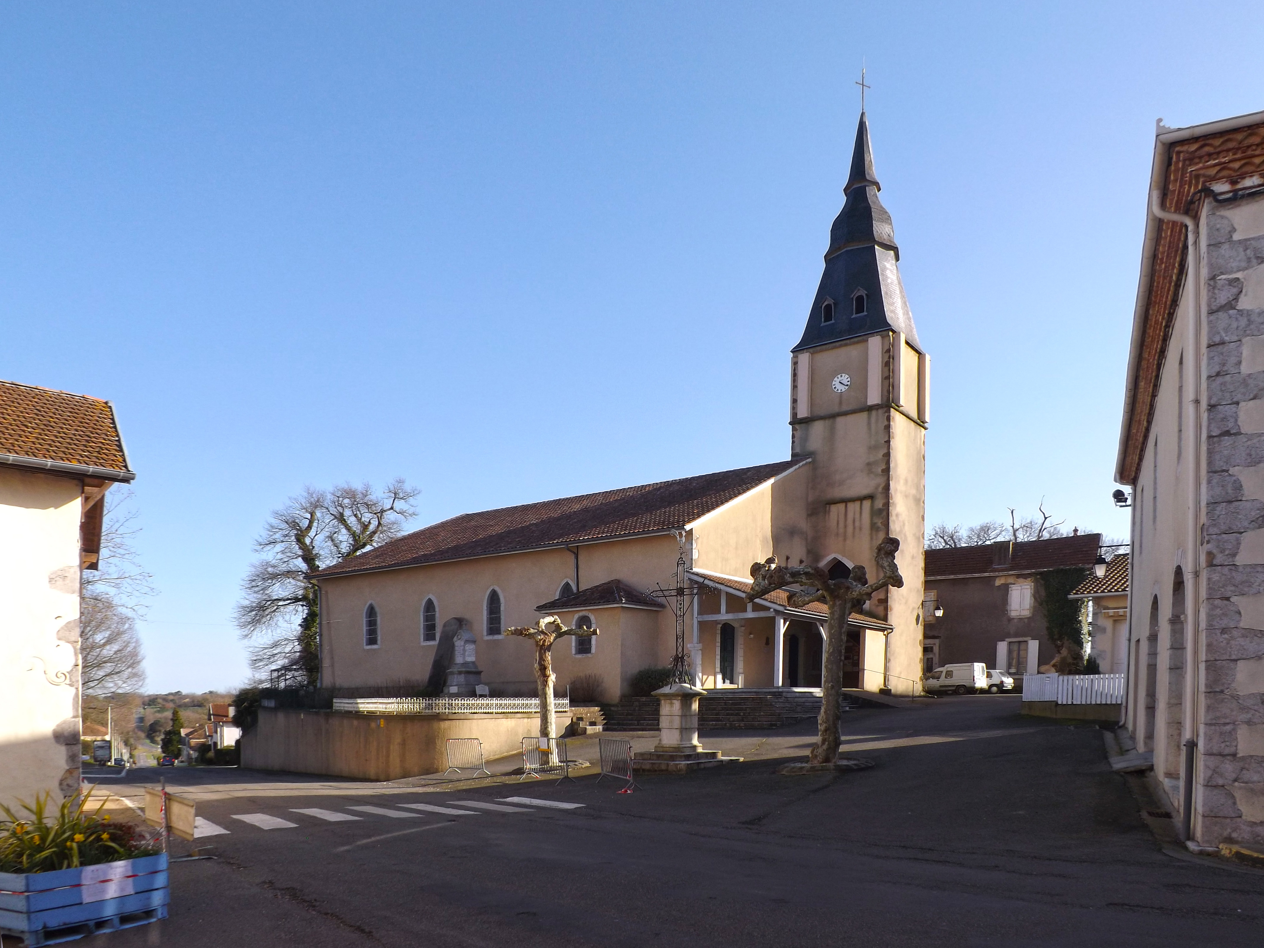 Glèisa de Tilh, Shalòssa, Gasconha